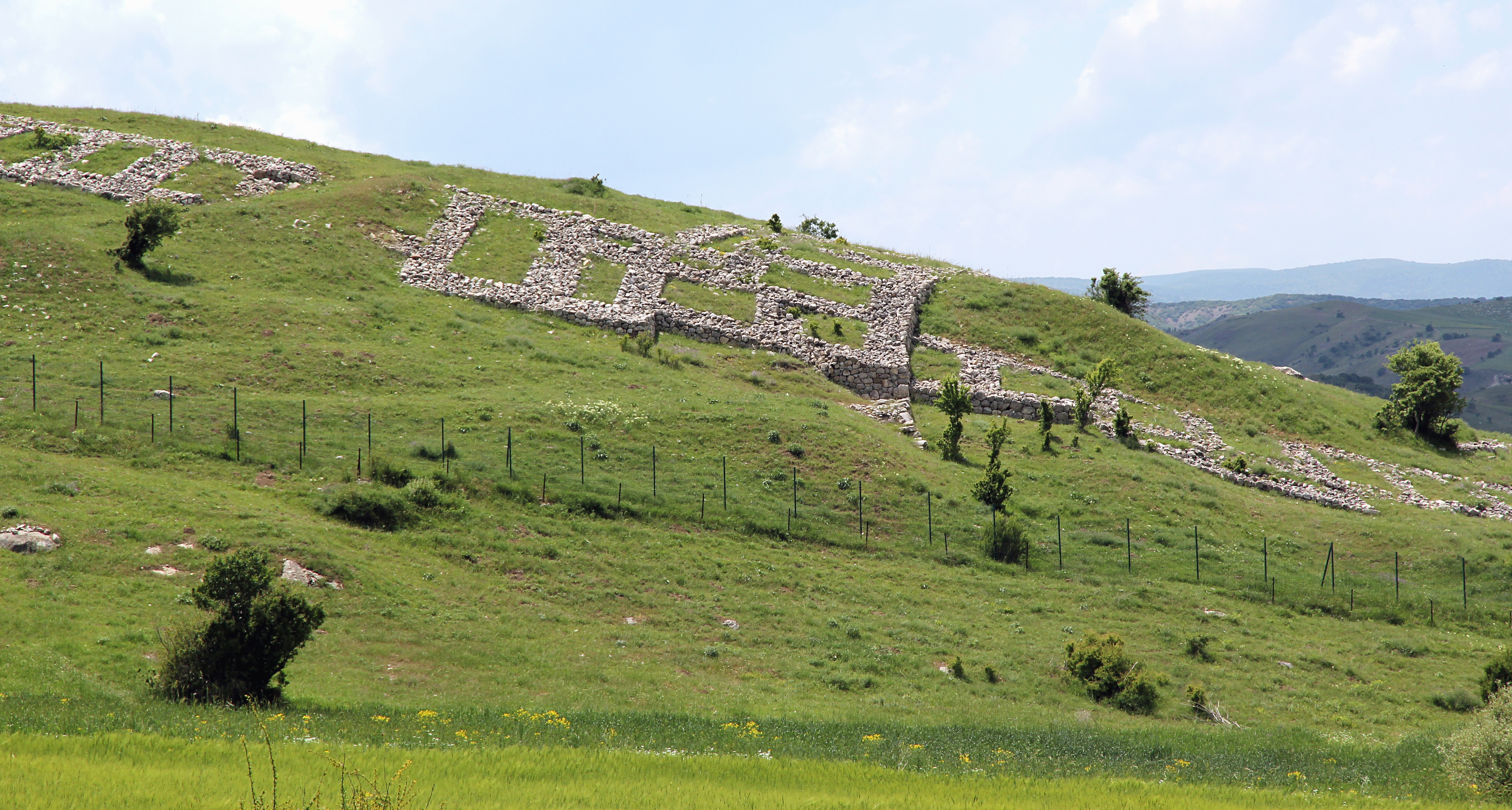 Ḫattuša, hethitische Hauptstadt bei Boğazkale, Zentraltürkei, Büyükkaya mit Stadtmauer von Osten